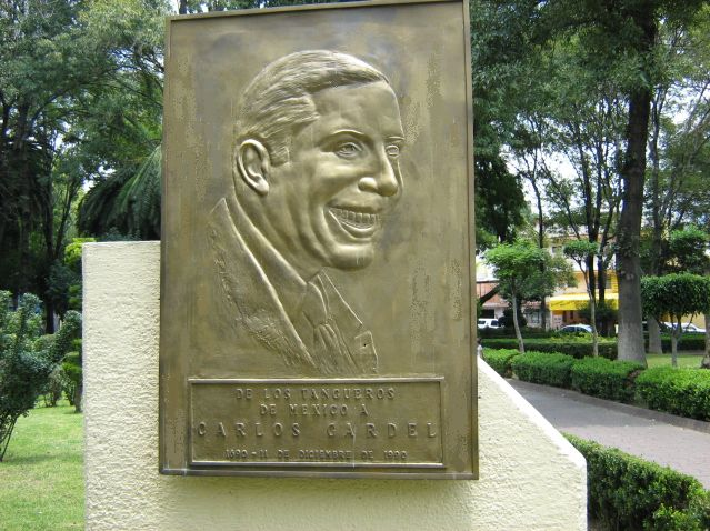 Placa conmemorativa por el centenario del nacimiento de Carlos Gardel (cantante y conpositor de tango de Argentina) en un parque de la colonia Del Valle, México, D. F.